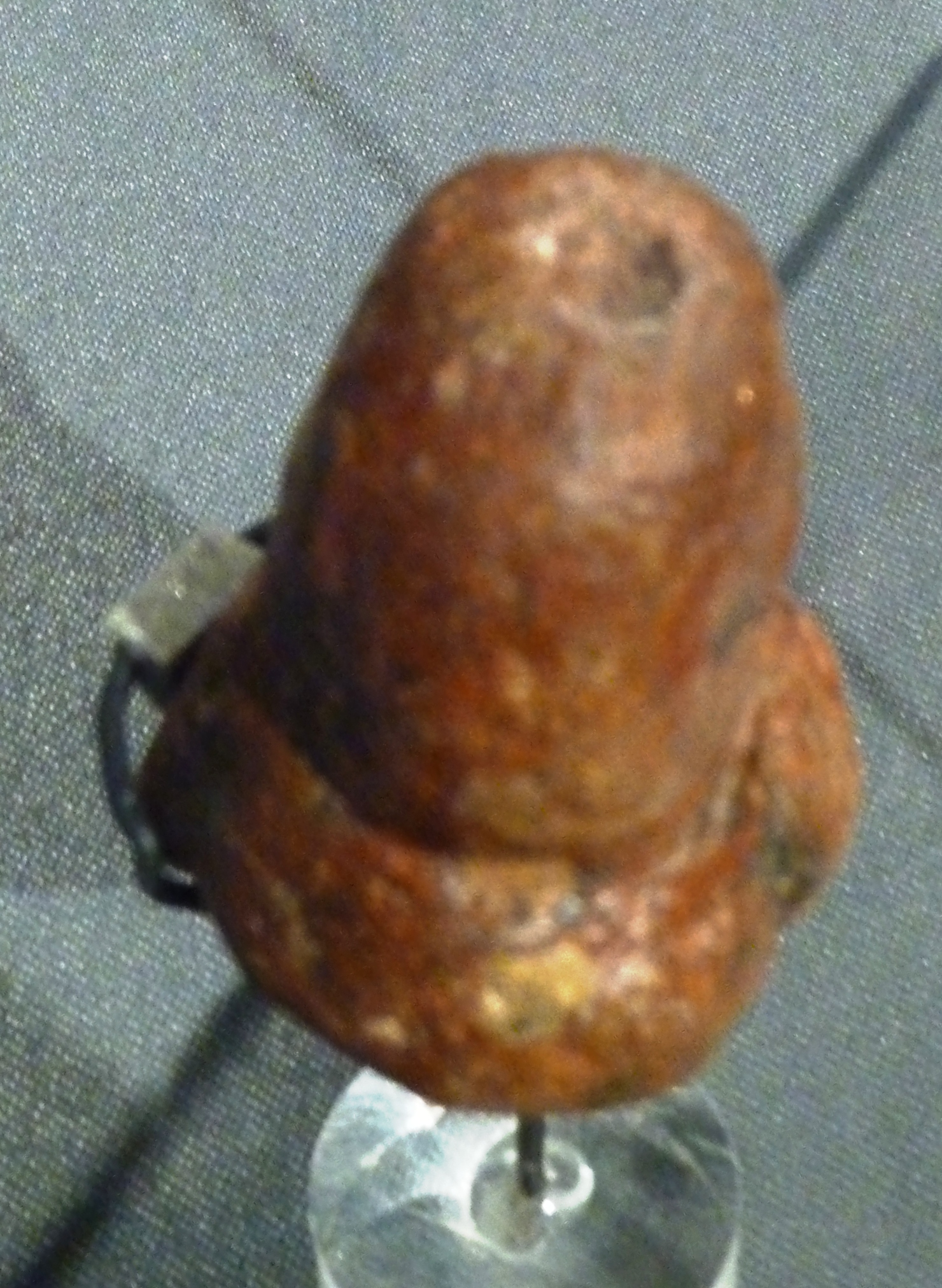 Die Venus von Mauern, eine steinzeitliche Figur, fotografiert in einer Ausstellung in Trento.